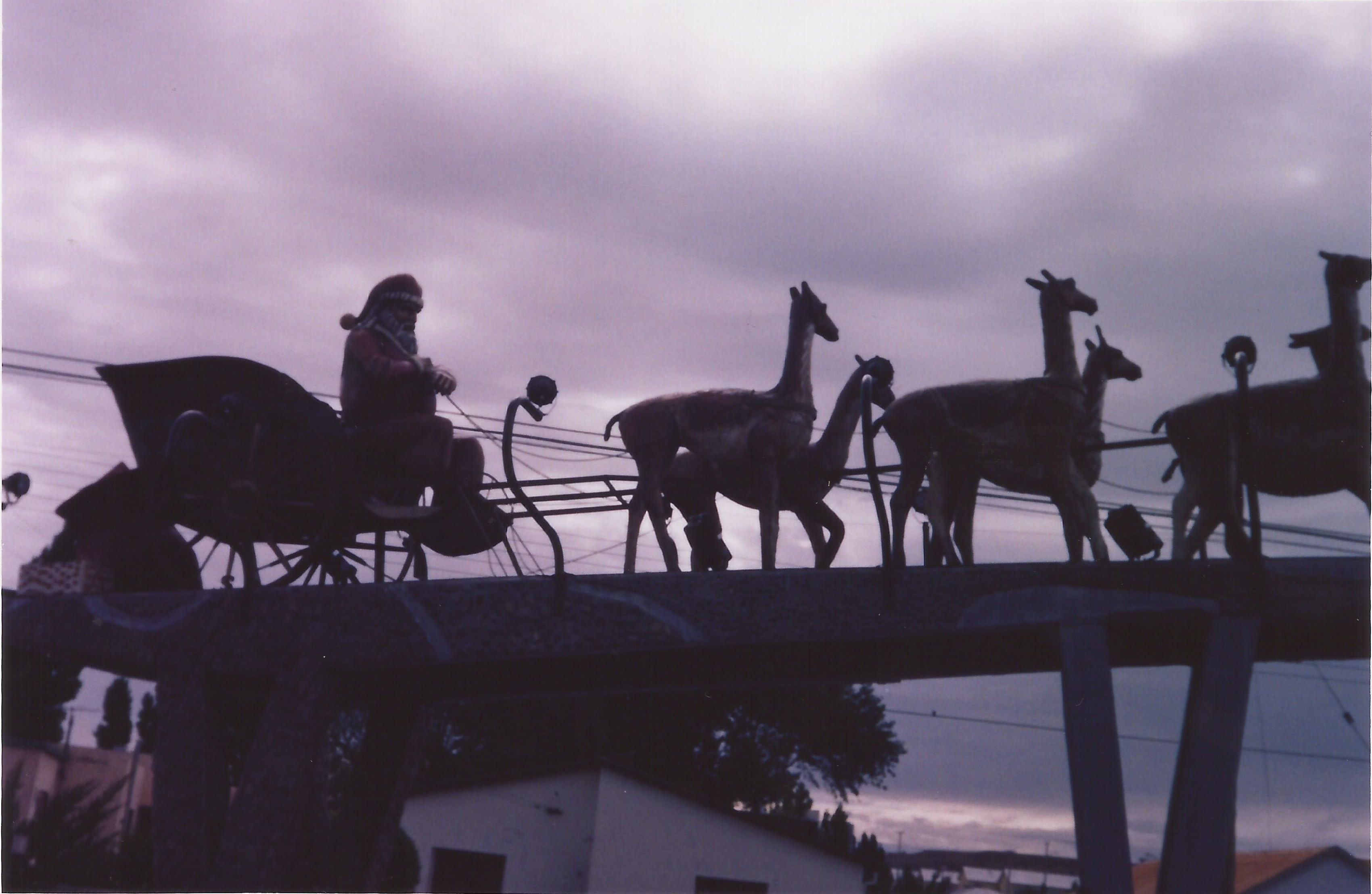 Navidad en Comandante Luis Piedrabuena, Santa Cruz, Patagonia, Argentina en diciembre de 2007.